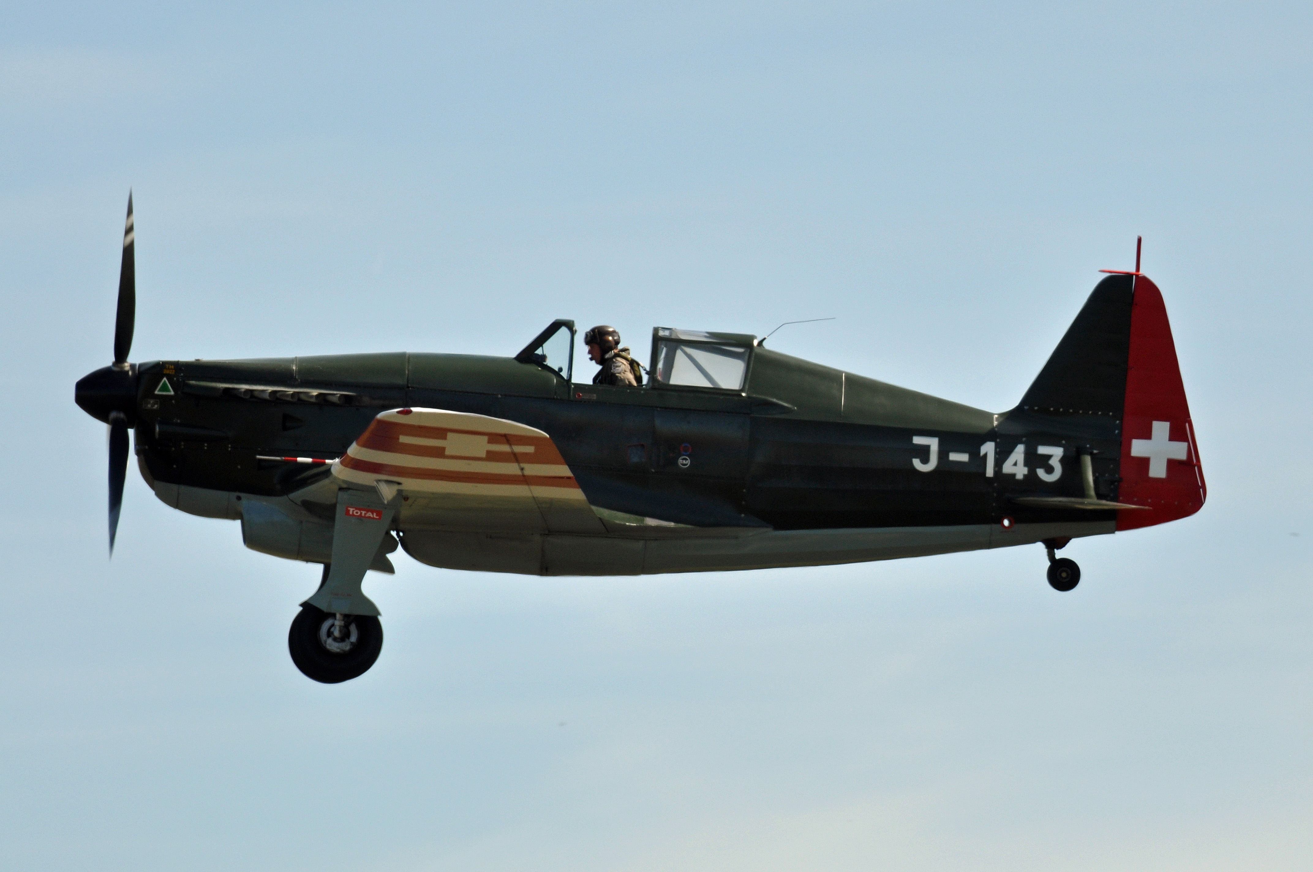 Le D-3801, variante suisse du MS.406, a été construit en 1941 par la Fabrique fédérale d’avions (F+W). Depuis 2007, le D-3801 (MS.406 fabriqué sous licence en Suisse) de l’Association Morane Charlie Fox, portait les couleurs du MS.406 piloté durant le mois de mai 1940 par le Commandant Marcel Coadou, commandant en second du Groupe de Chasse 1/2 Cigognes. L’avion restauré était principalement engagé sur des meetings de l’Armée de l’Air française, d’où le choix de cette décoration. Mais il est revenu récemment aux couleurs suisses.